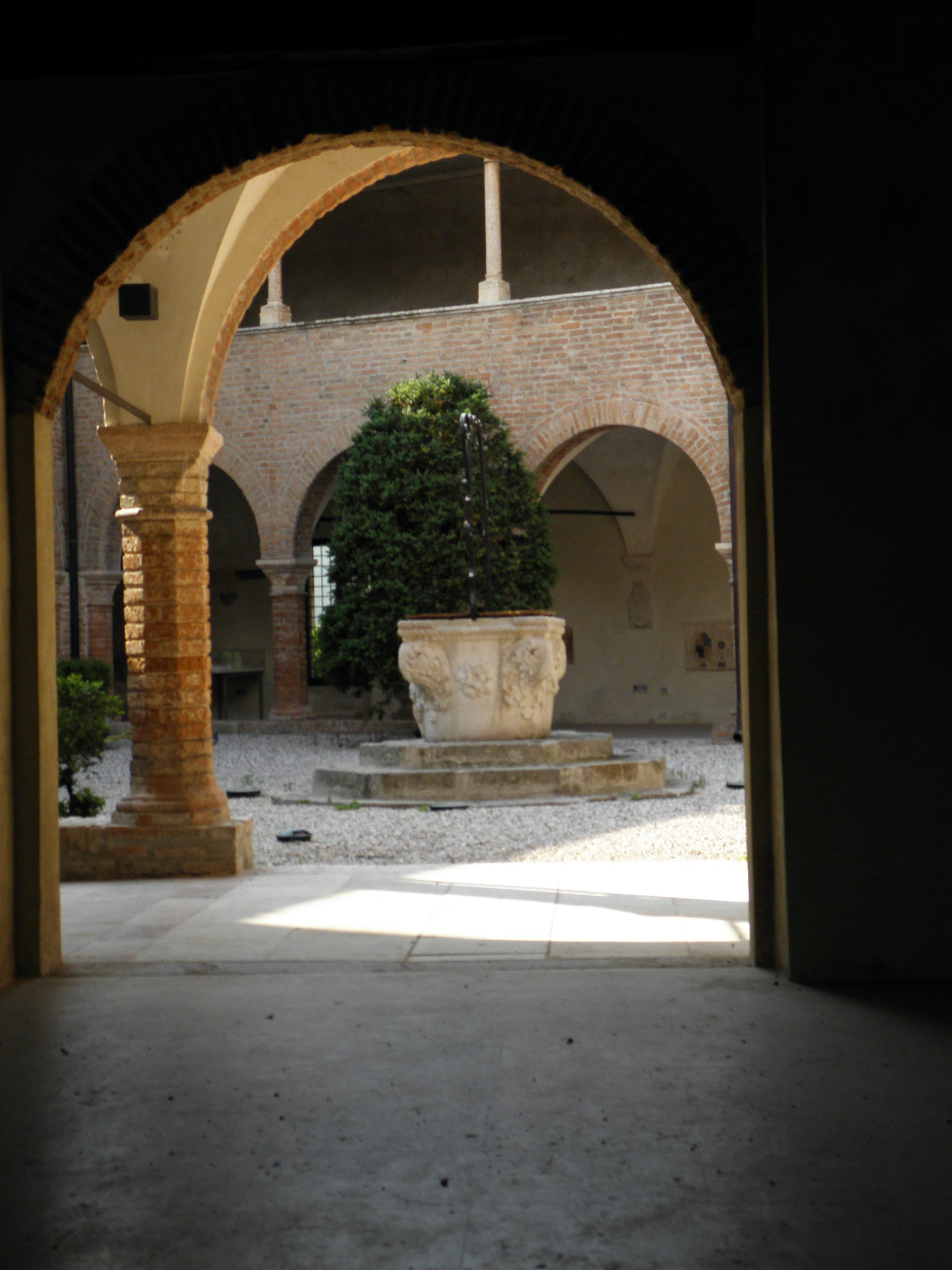 Badia Polesine: vista dall'esterno del chiostro con vera del pozzo dell'abbazia della Vangadizza.